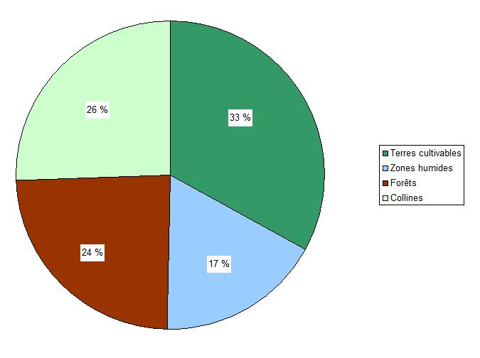 Utilisation des terres, dans le district de Chittagong, division de Chittagong, Bangladesh.